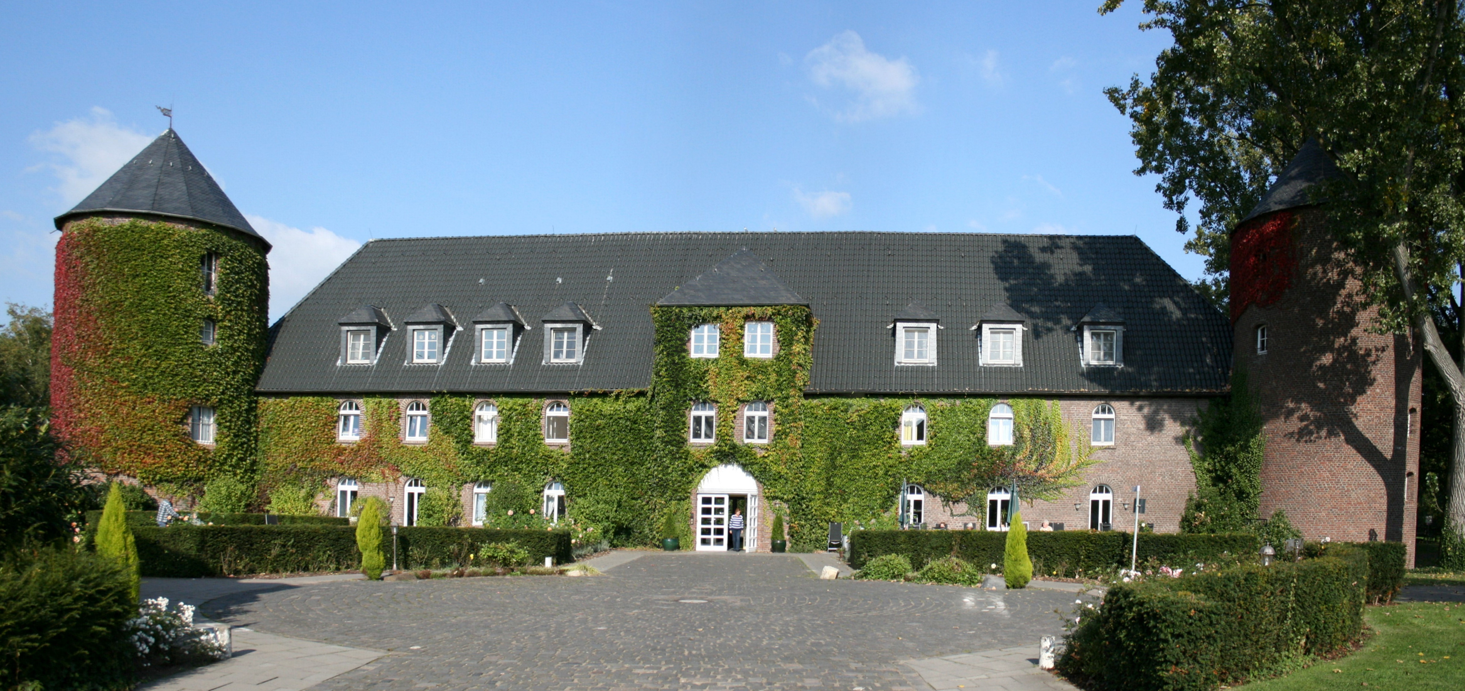 Vorburg von Haus Winnenthal in Xanten-Birten, Ansicht von Südwesten